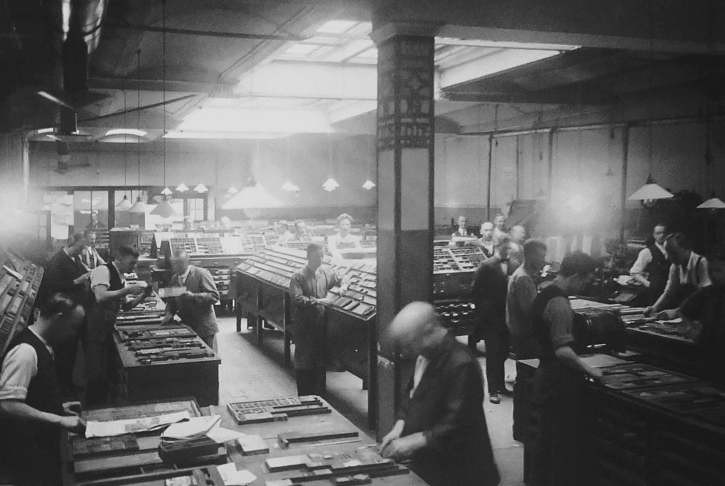 DN:s handsätteri i Klarakvarteren